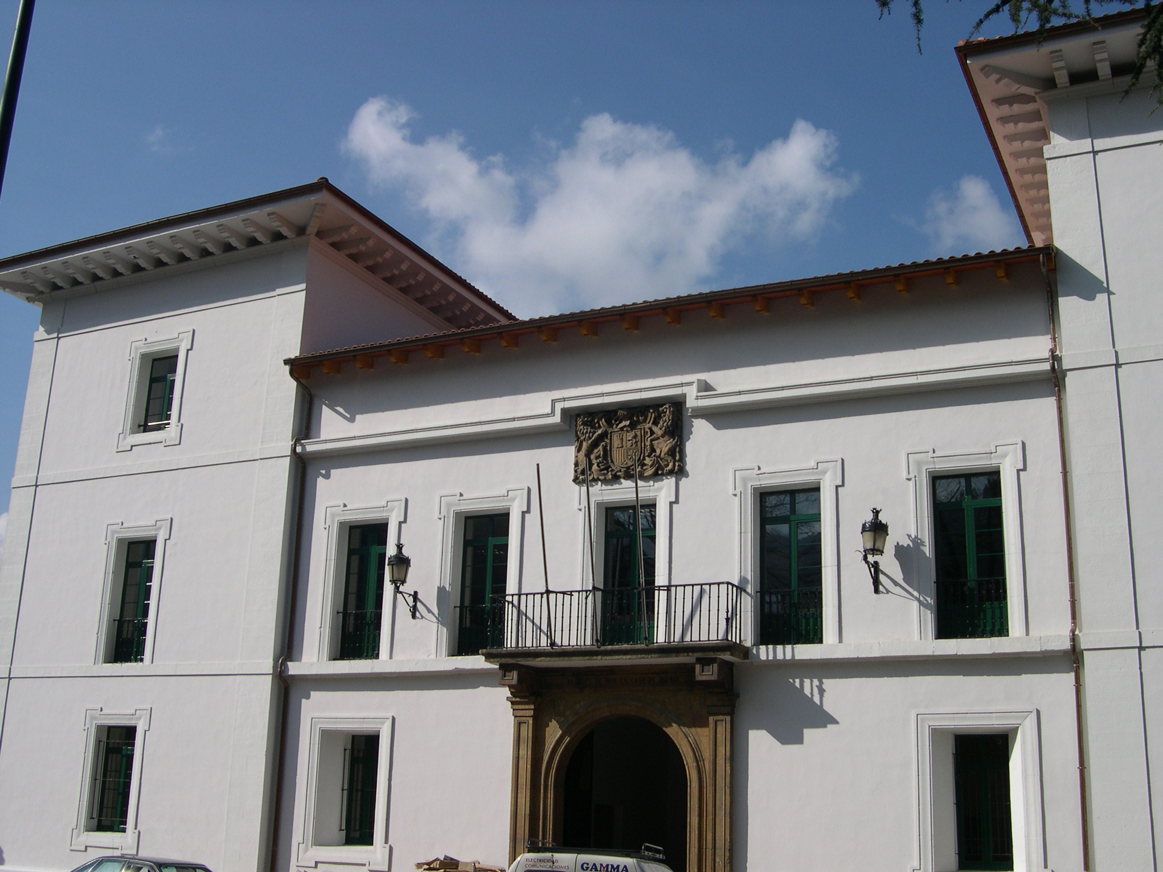 Palaciu Marques de Campusagráu, sieglu XV, Mieres, Asturies